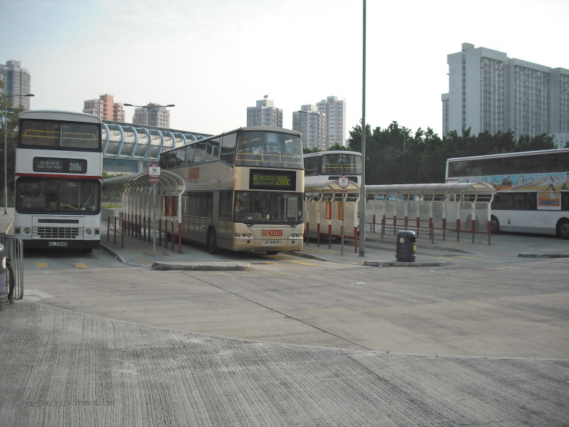 朗屏西鐵站巴士總站